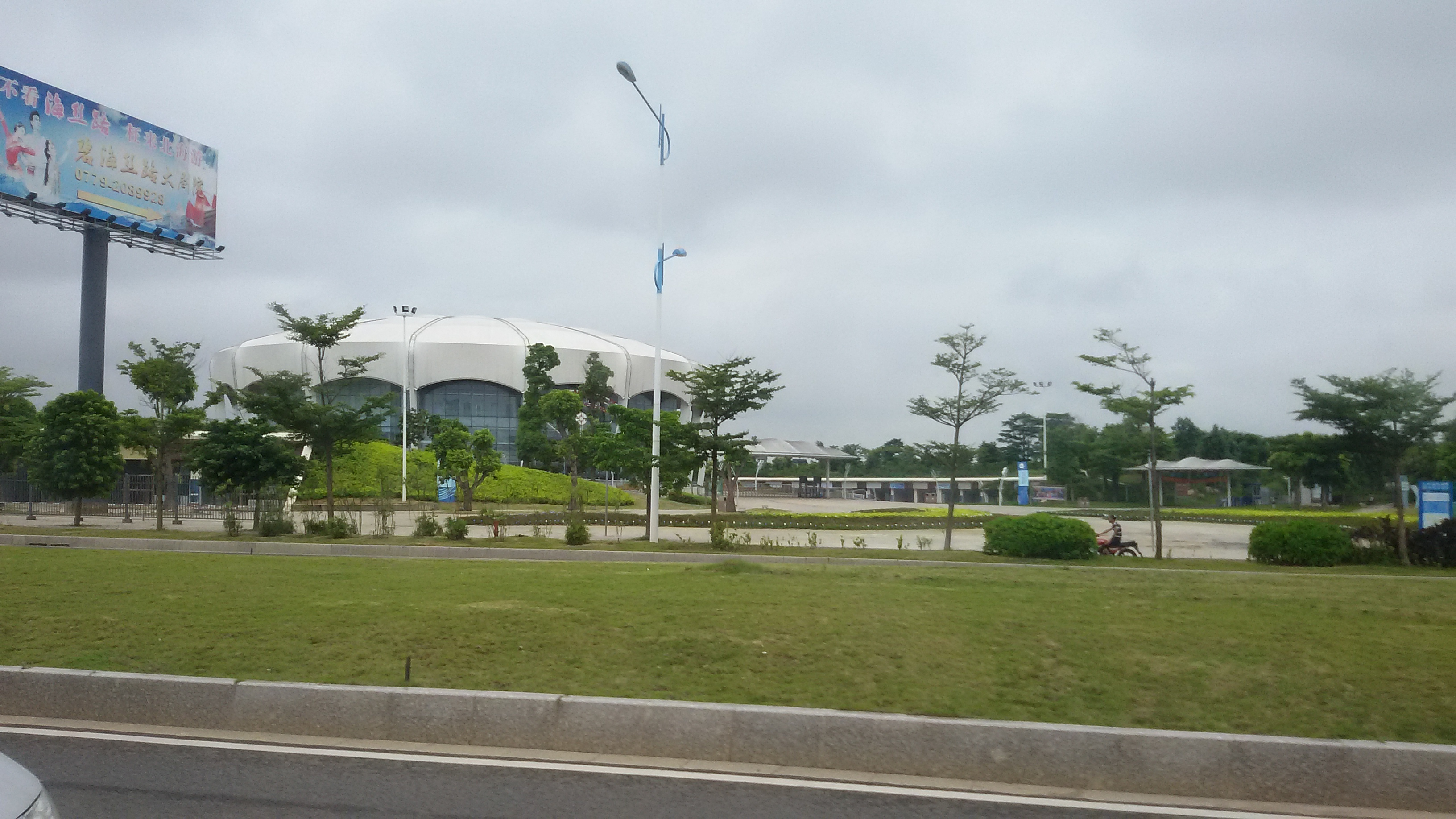 粵語: 北海园博园